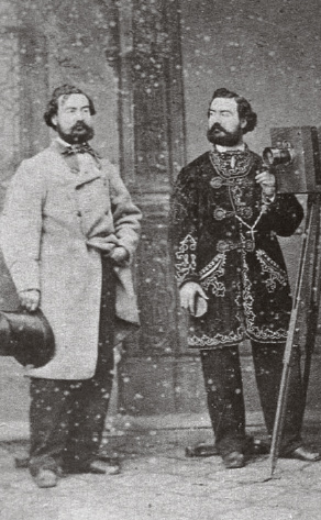 Autoretrat doble d'Antonio Fernandez, marit d'Anaïs Napoleon i creador de la nissaga dels fotògrafs Napoleon.